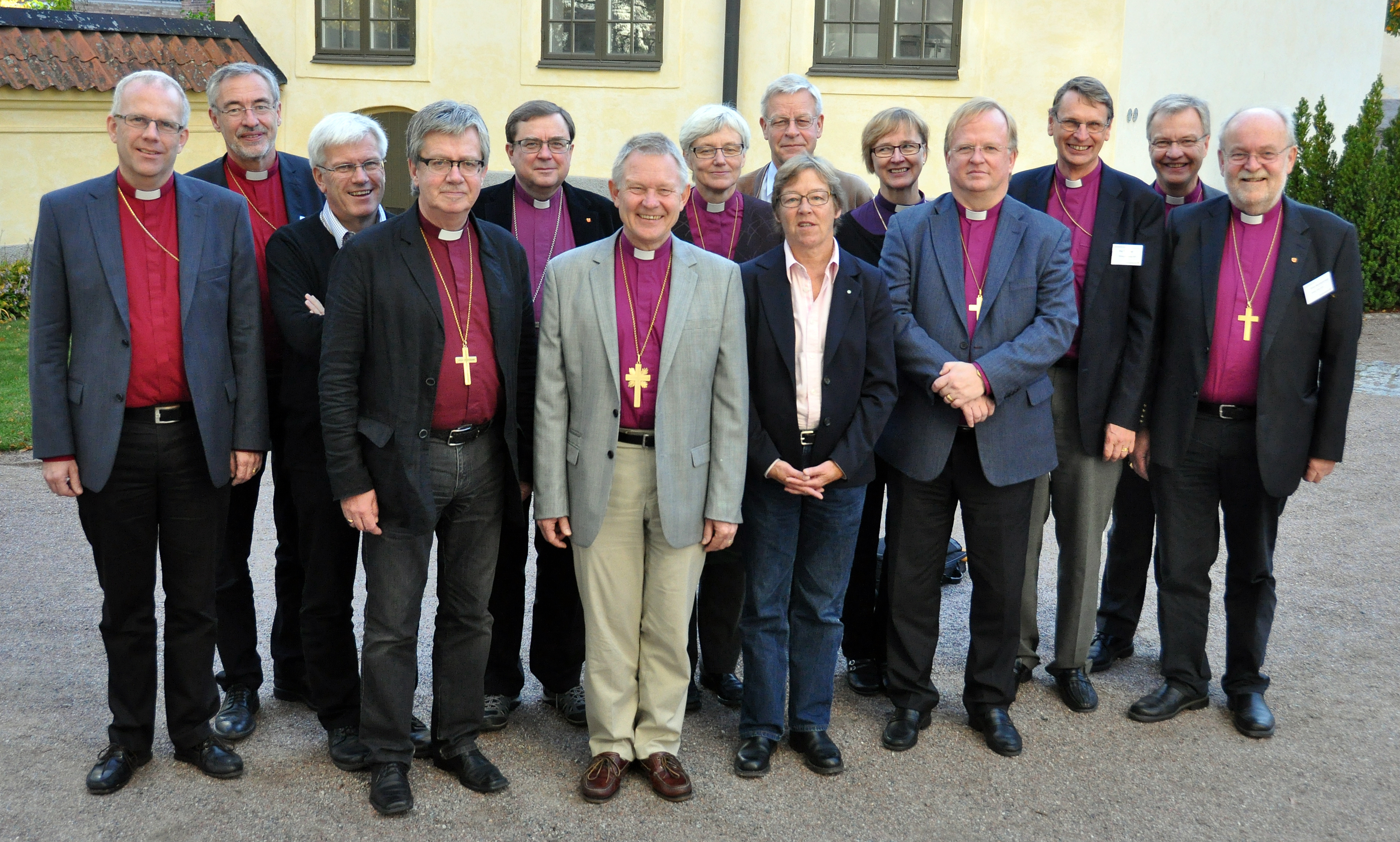 Biskoparna i Svenska Kyrkan, september 2011. Från vänster: Martin Modéus Linköping, Esbjörn Hagberg Karlstad, Hans Stiglund Luleå, Jan-Olof Johansson Växjö, Thomas Söderberg Västerås, ärkebiskop Anders Wejryd, Antje Jackelén Lund, Erik Aurelius (d.y.) Skara, Eva Brunne Stockholm, Tuulikki Koivunen Bylund Härnösand, Ragnar Persenius Uppsala, Per Eckerdal Göteborg, Hans-Erik Nordin Strängnäs samt Sven-Bernhard Fast Visby.